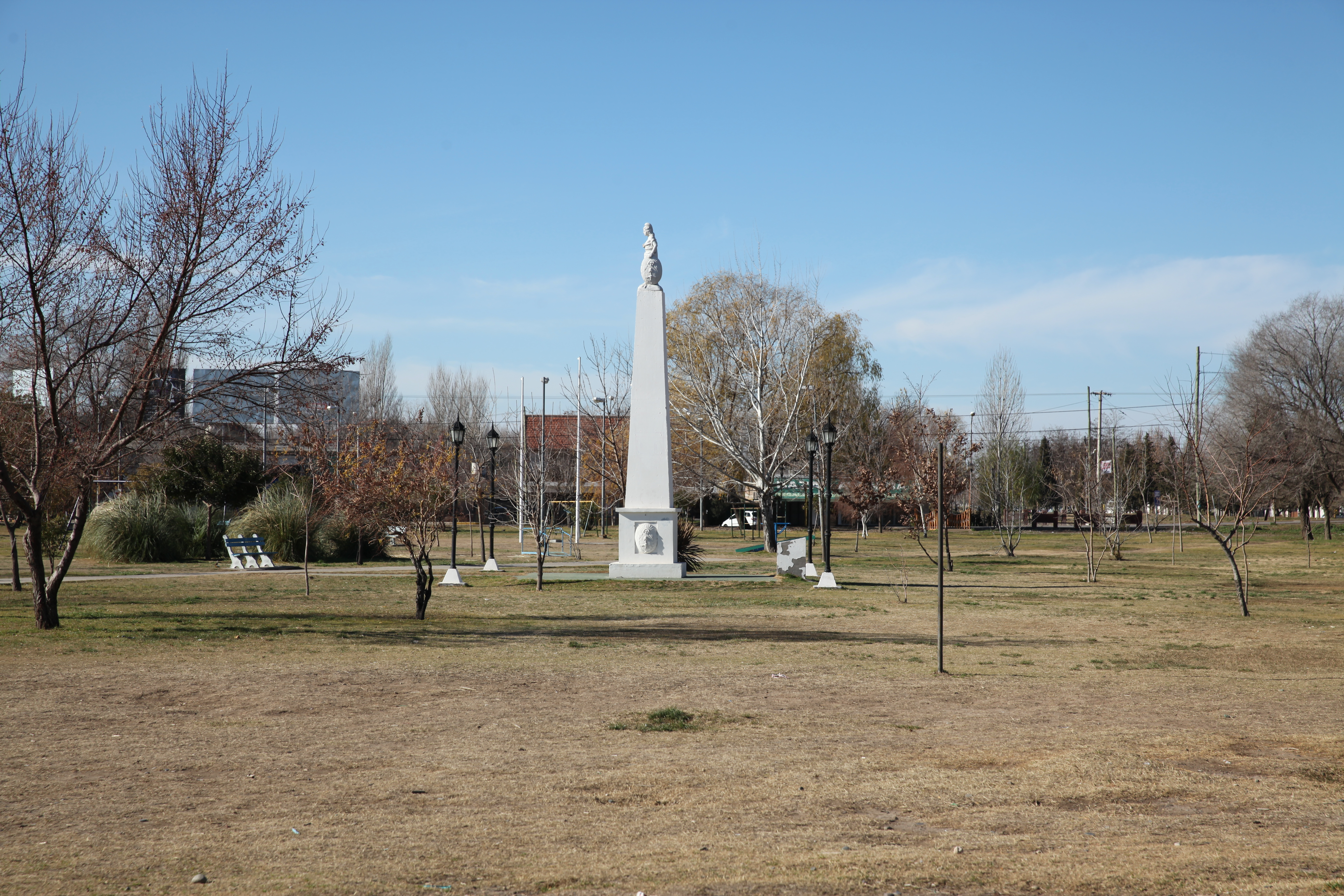 Plottier, Confluencia Department, Neuquen, Argentina